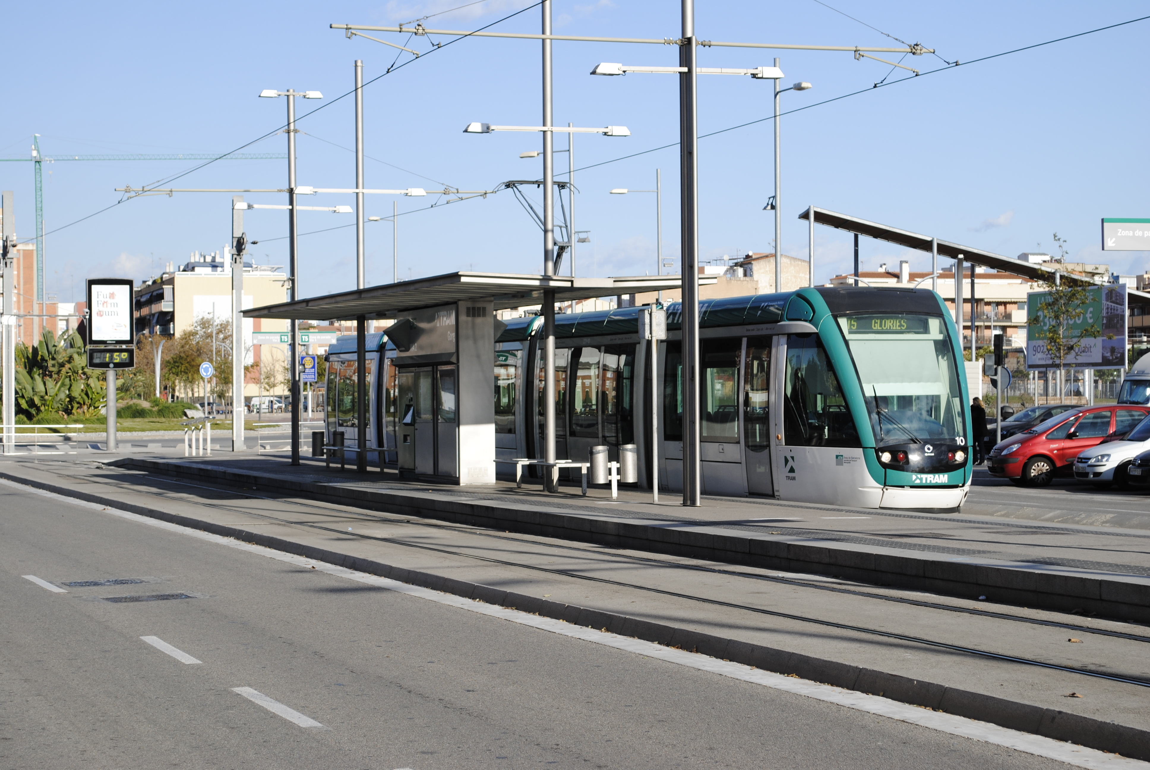 Parada de l'estació de Trambesòs Gorg